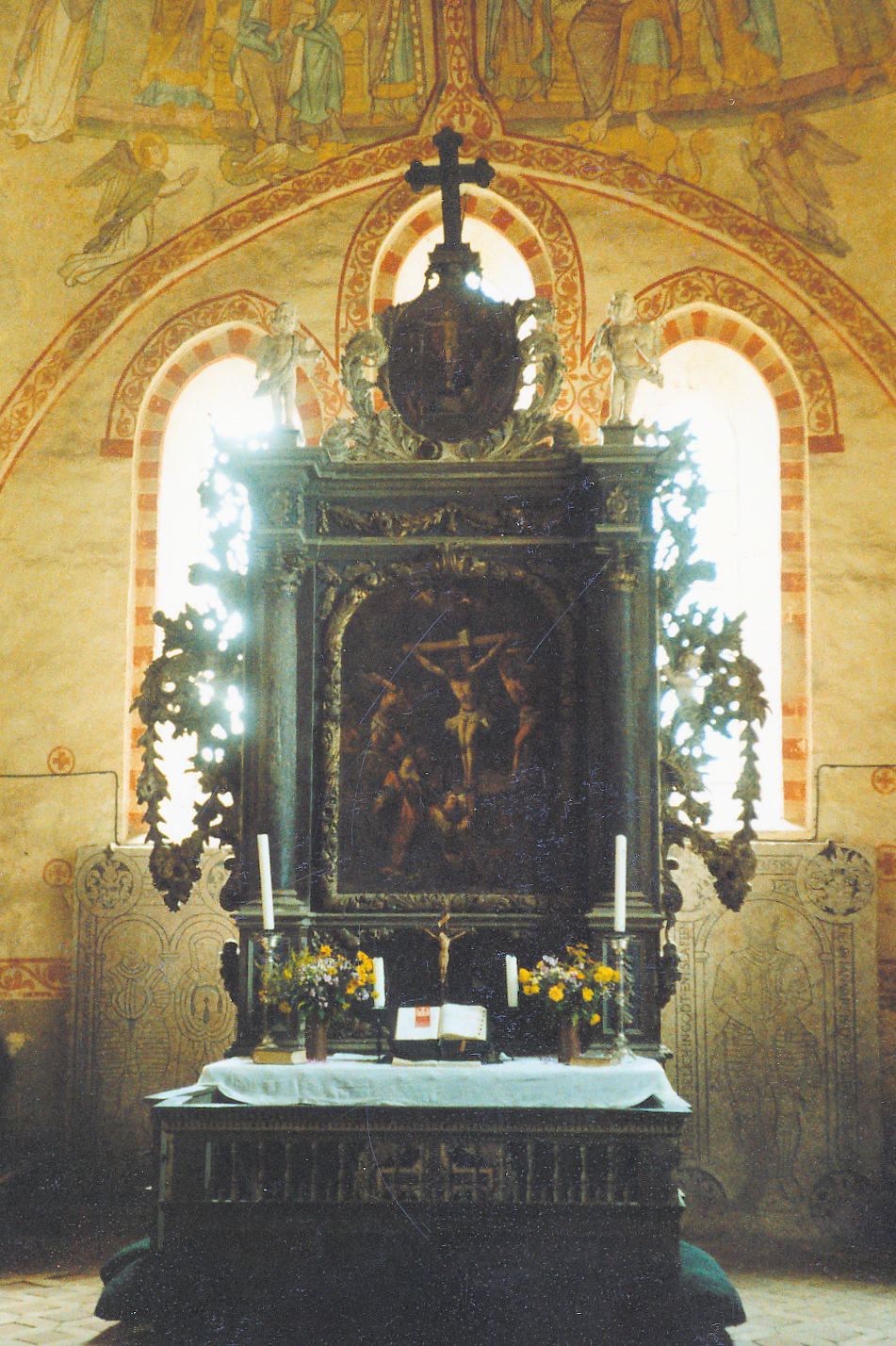 Altar der Kirche von Hohen Sprenz Datum: um 1980 Urheber: verstorbene Bekannte der eigenen Familie Quelle: privates Fotoarchiv der eigenen Familie